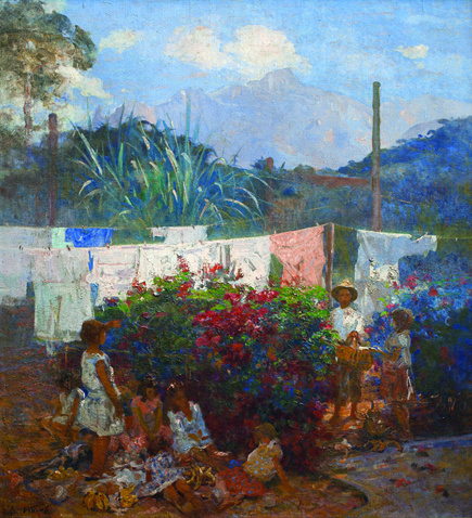 O_BATISMO_DA_BONECA-OST-94x87-c.1933 / Visconti, Eliseu d'Angelo; Óleo sobre tela, (circa 1933), Coleção Particular, São Paulo - Brasil. Dimensões da obra: 96 x 87 cm